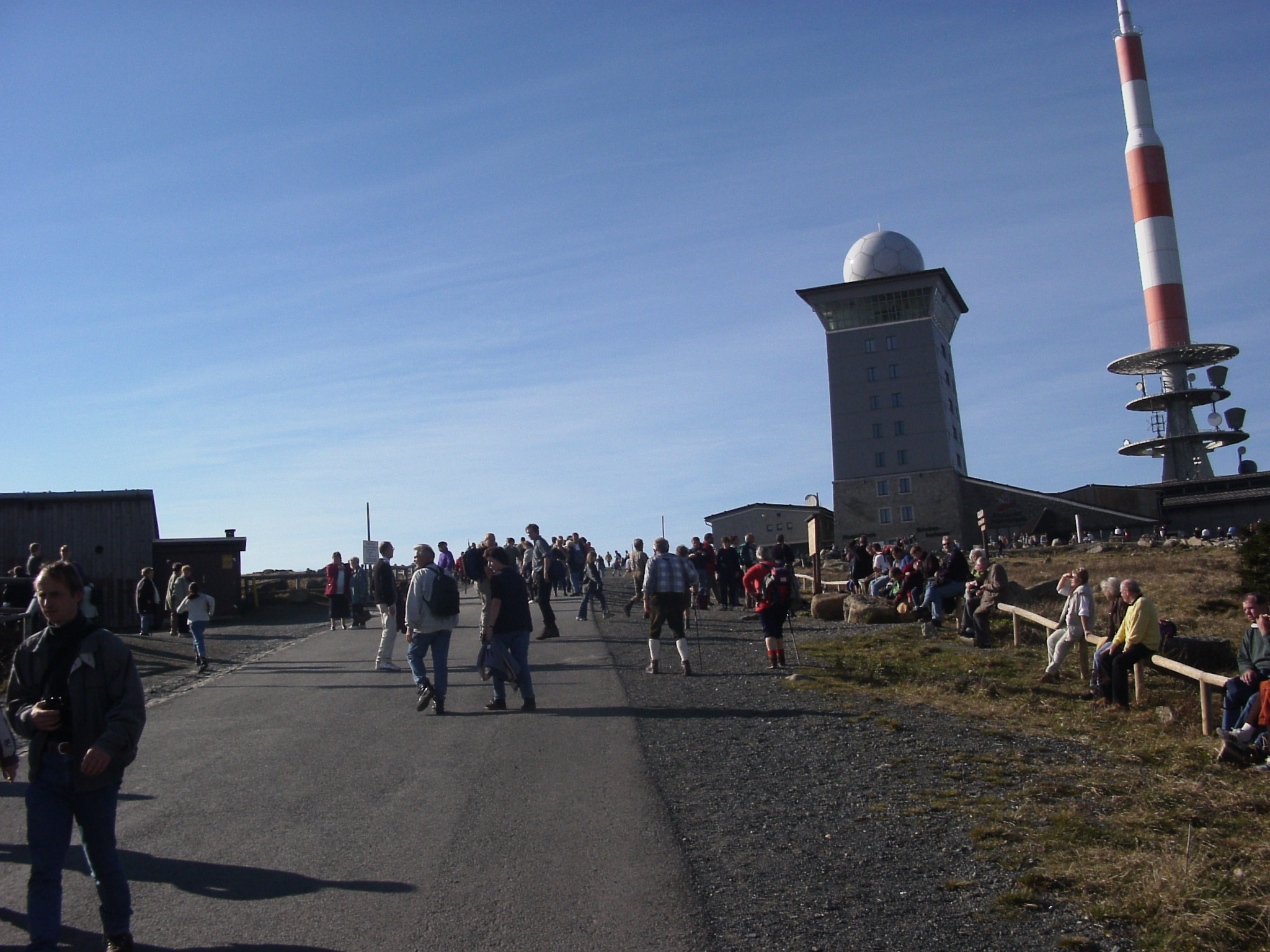 Massentourismus auf dem Brocken